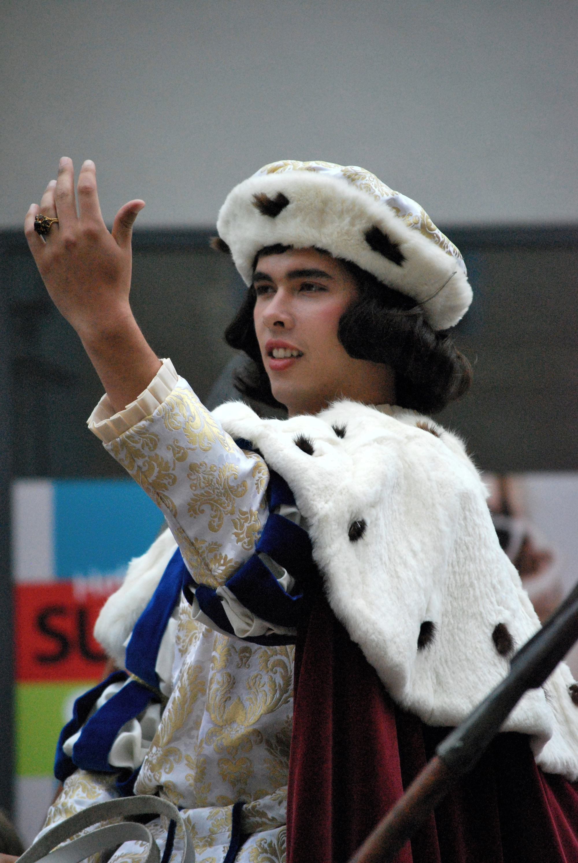 Das Bild zeigt Kaiser Maximilian zum Tänzelfest 2011.